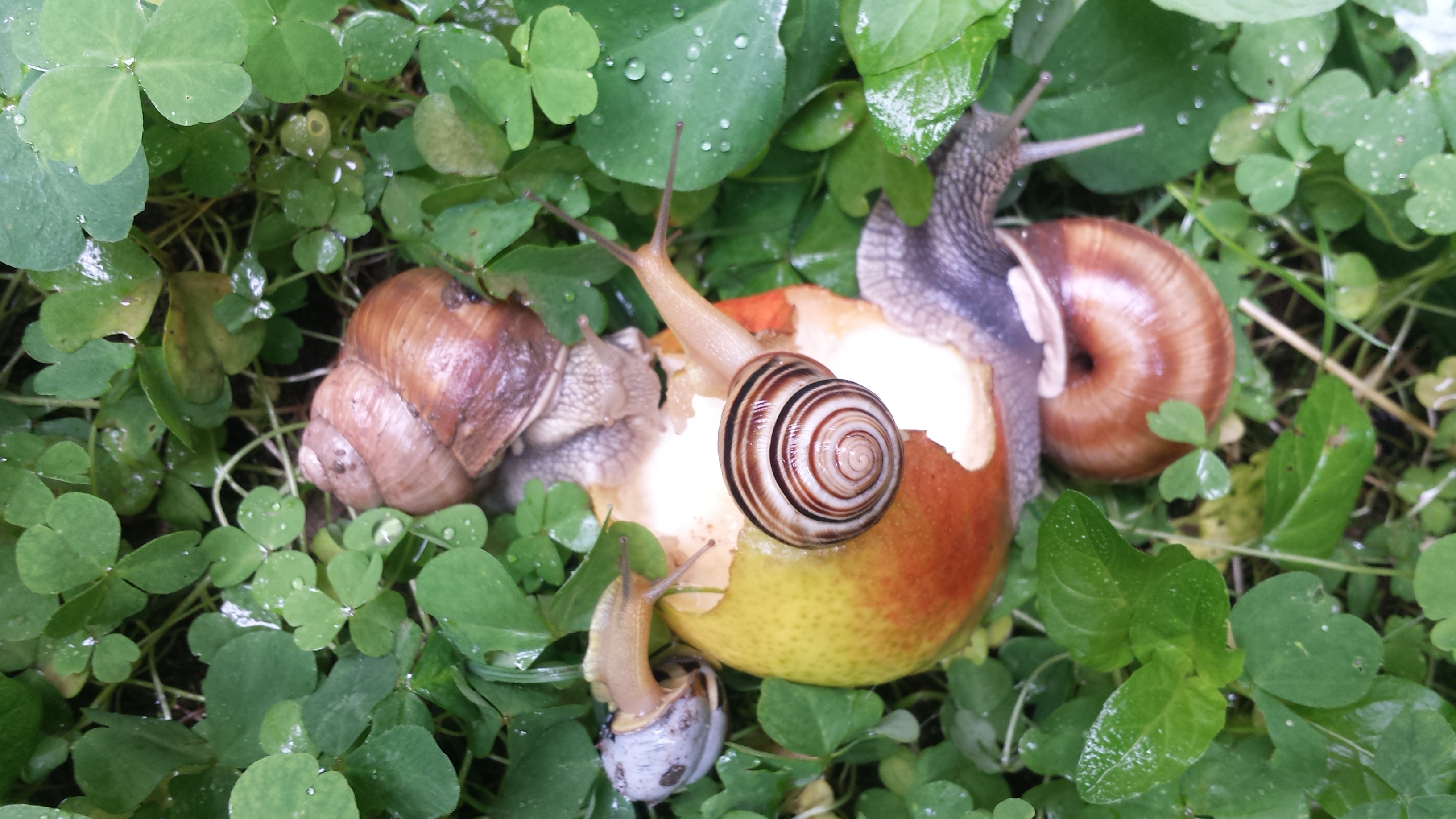 Пужеви једу јабуку